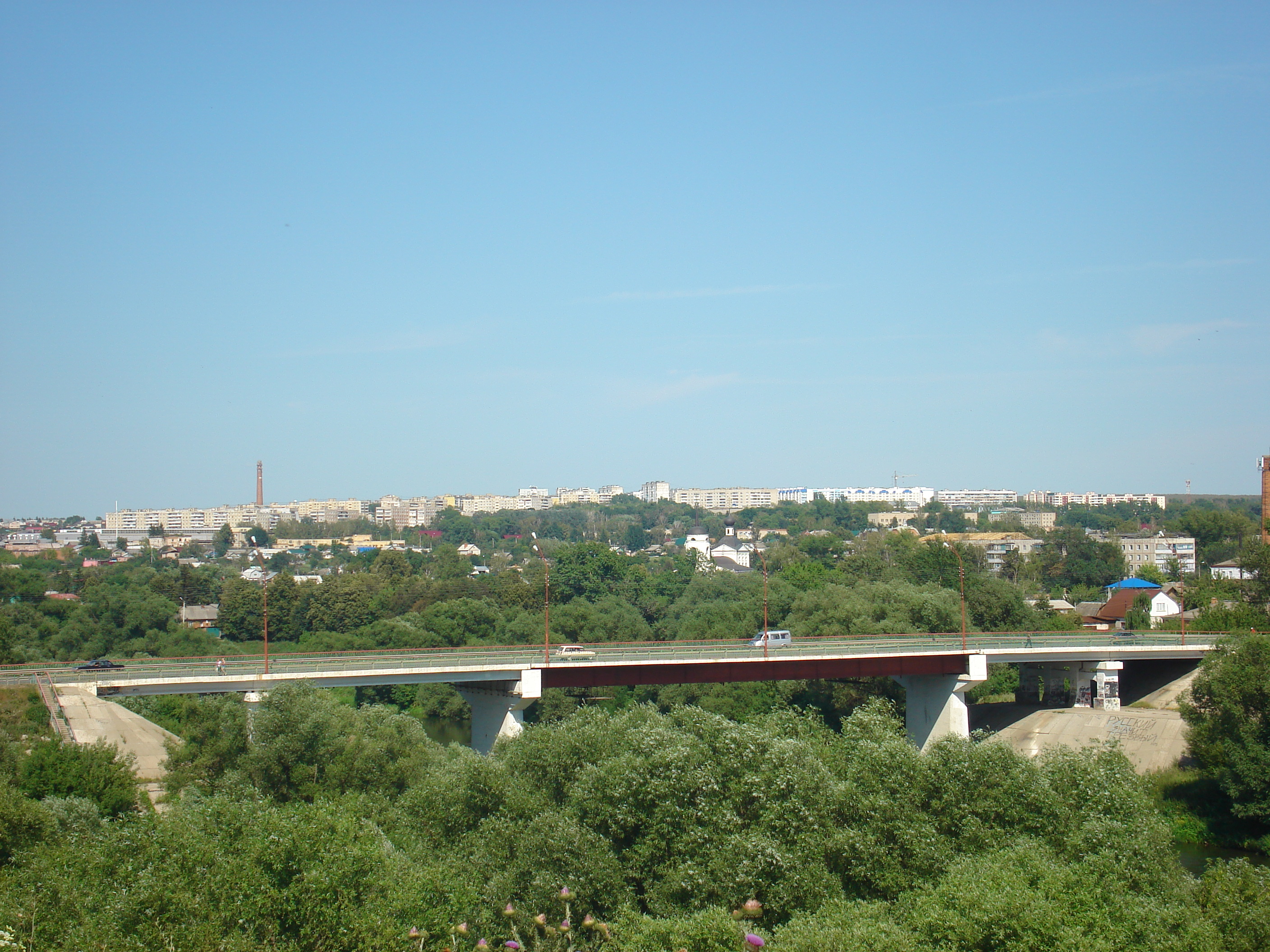 Панорама Мценска